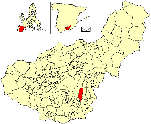 Situación del término municipal de Bérchules respecto a la provincia de Granada, en España.